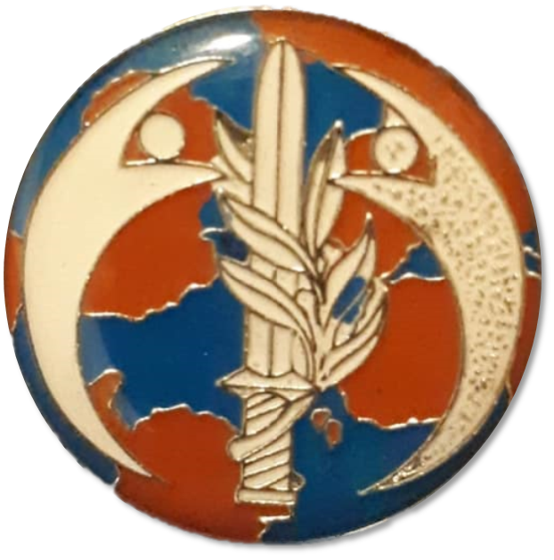 סיכת מערך הקש"ח של צה"ל